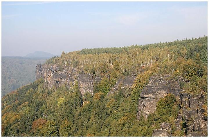 Růžový hřeben autor: Prazak date: October 2006